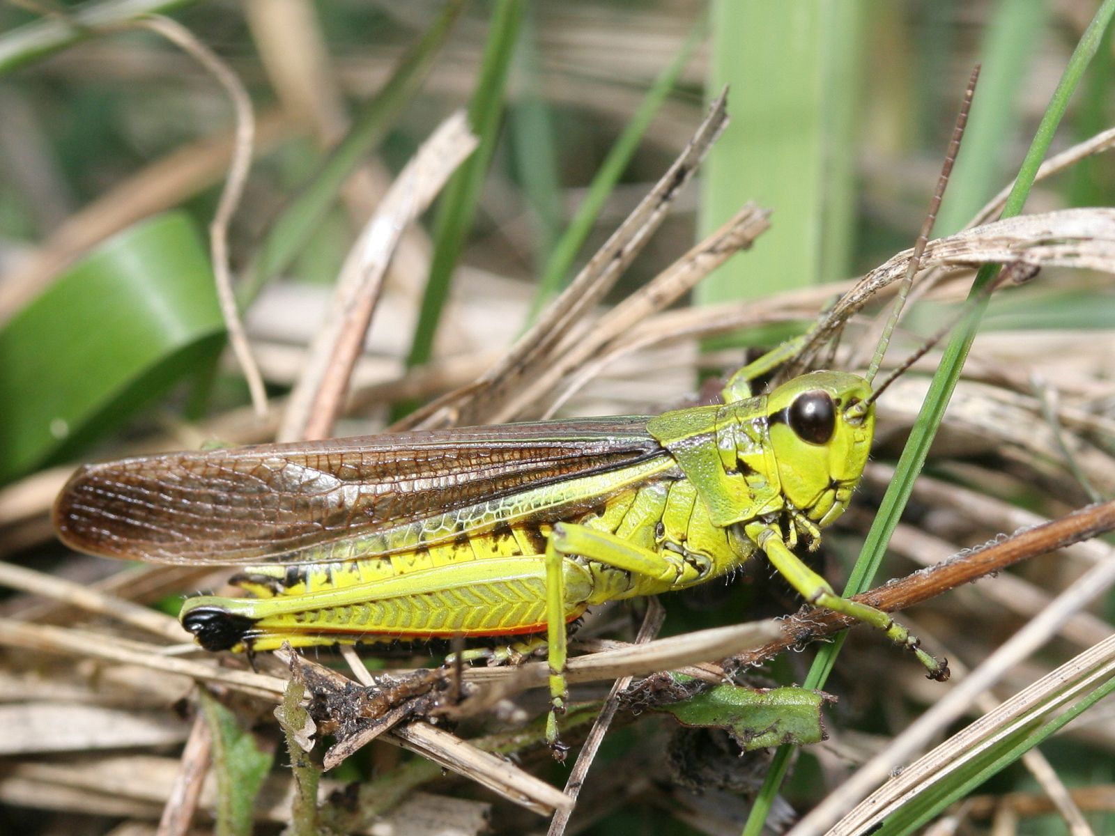 Sumpfschrecke (Stethophyma grossum), Männchen